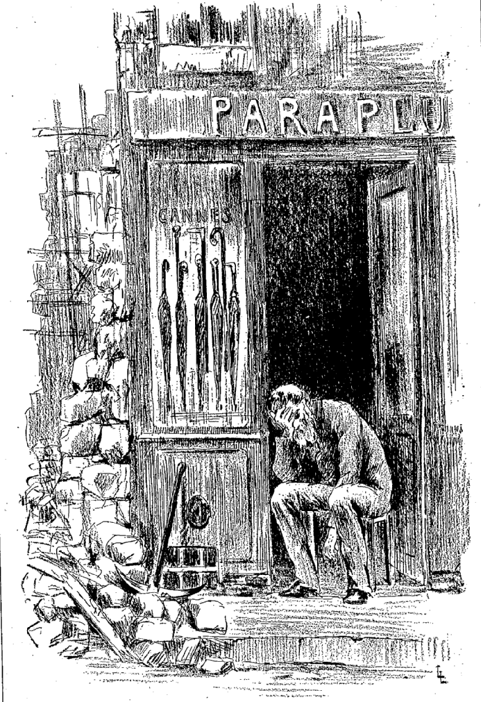 Illustration de Au Bonheur des Dames tirée des Œuvres complètes illustrées de Émile Zola, T1, Fasquelle, 1906, Le père Bourras devant son magasin, p.425